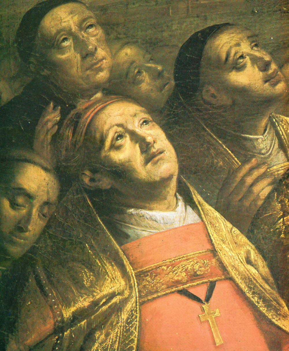 Opat Antoni Hacki Anthony Hacki, abbot of Cistercian Closter in Oliwa, Poland